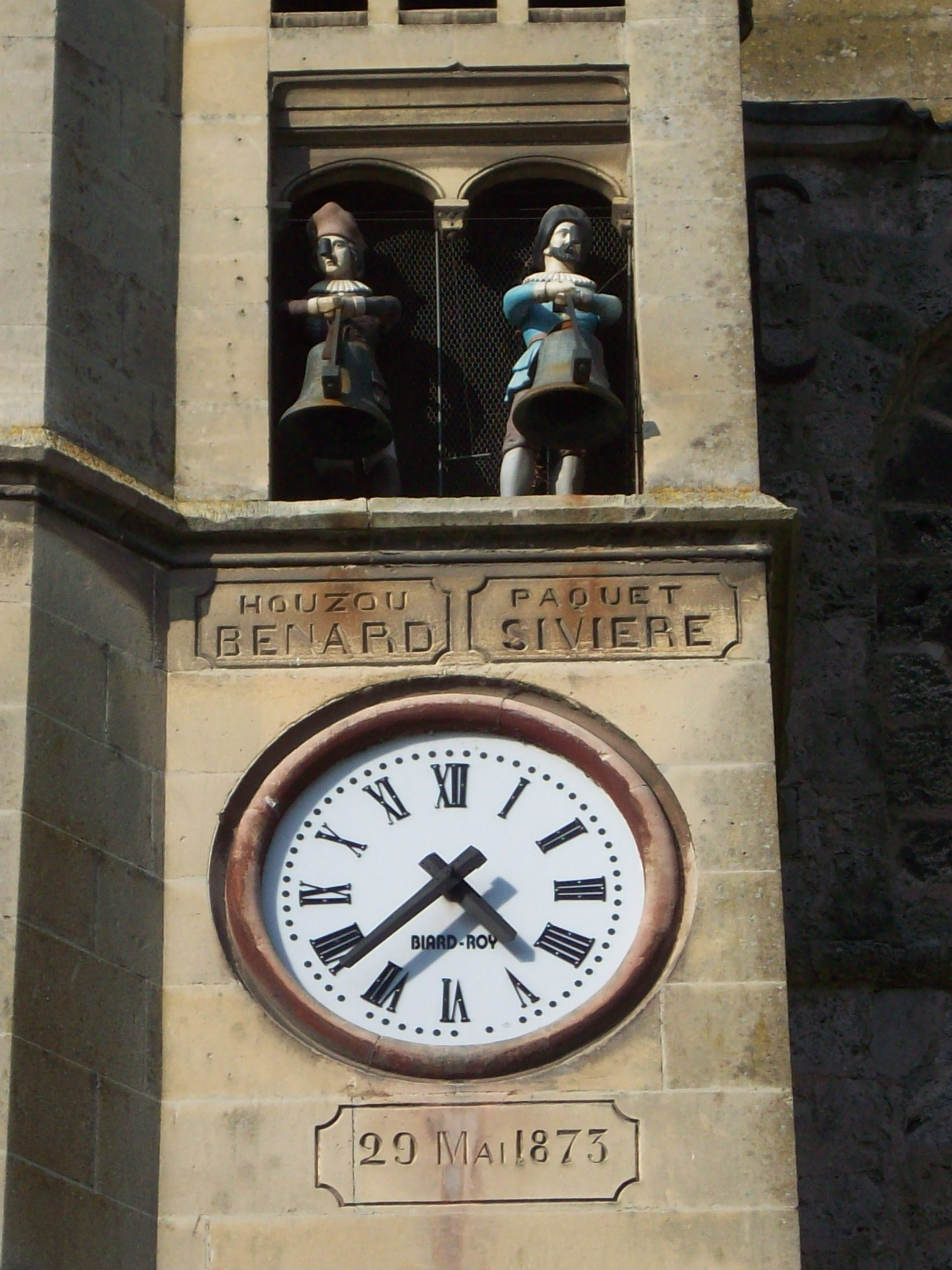 Horloge et Jacquemarts, nommés Houzou Bénard et Paquet Sivière, sur le transept sud de la collégiale.